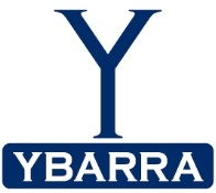 Logo de Ybarra